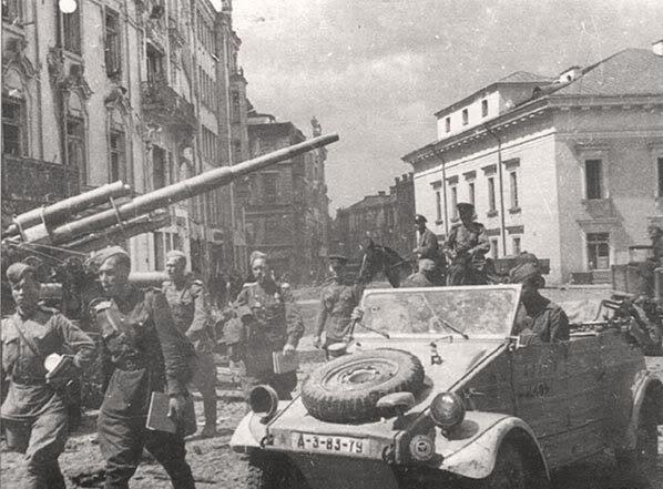 РККА в Вильнюсе, 1944